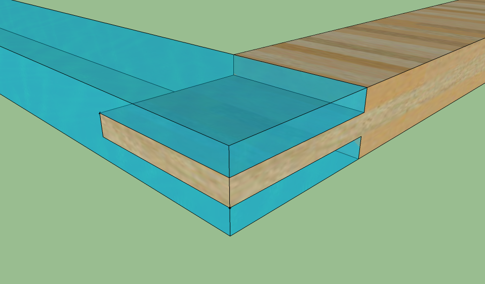 Sarokkötés ollós csapozással